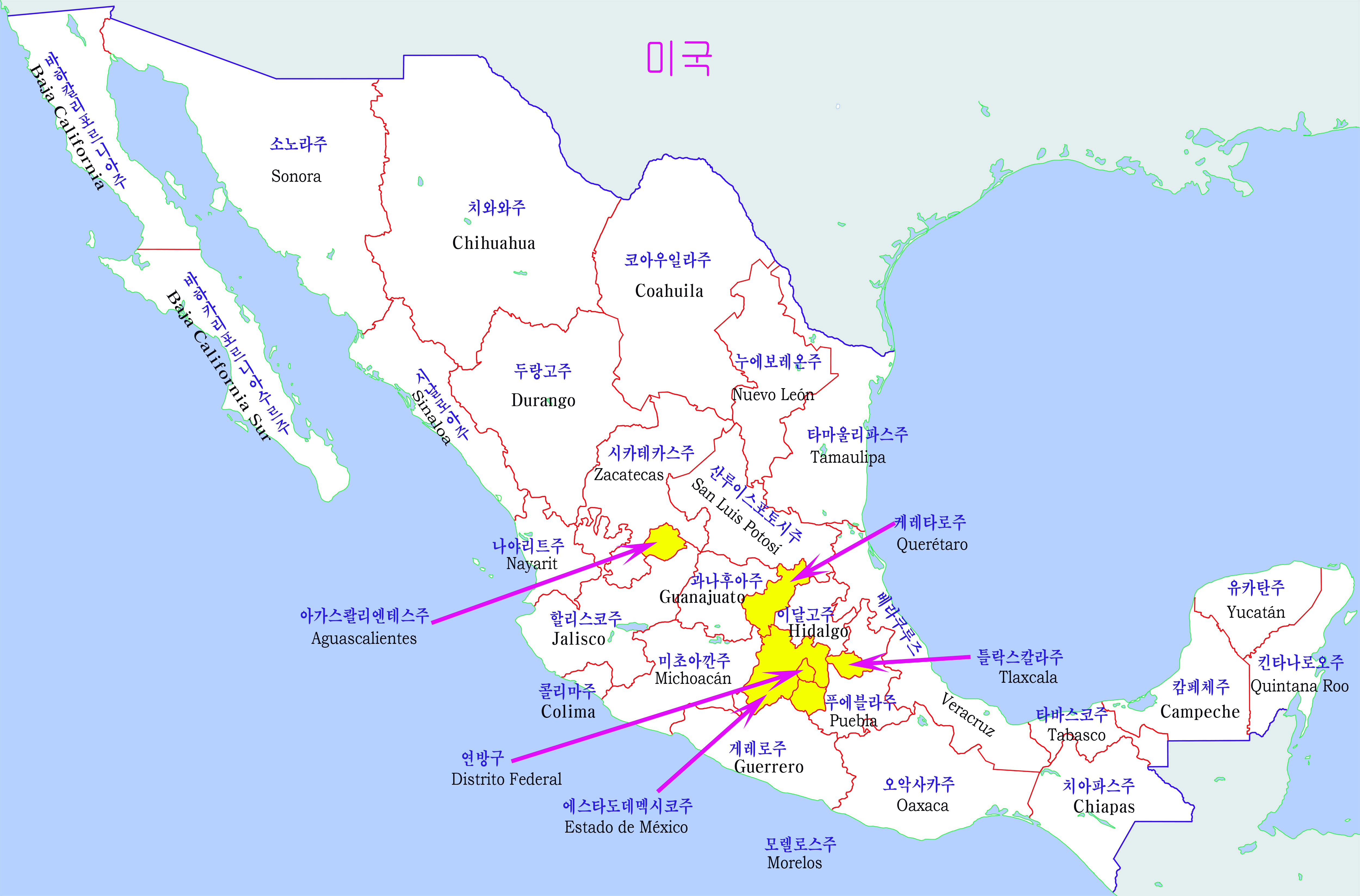 멕시코 행정구역